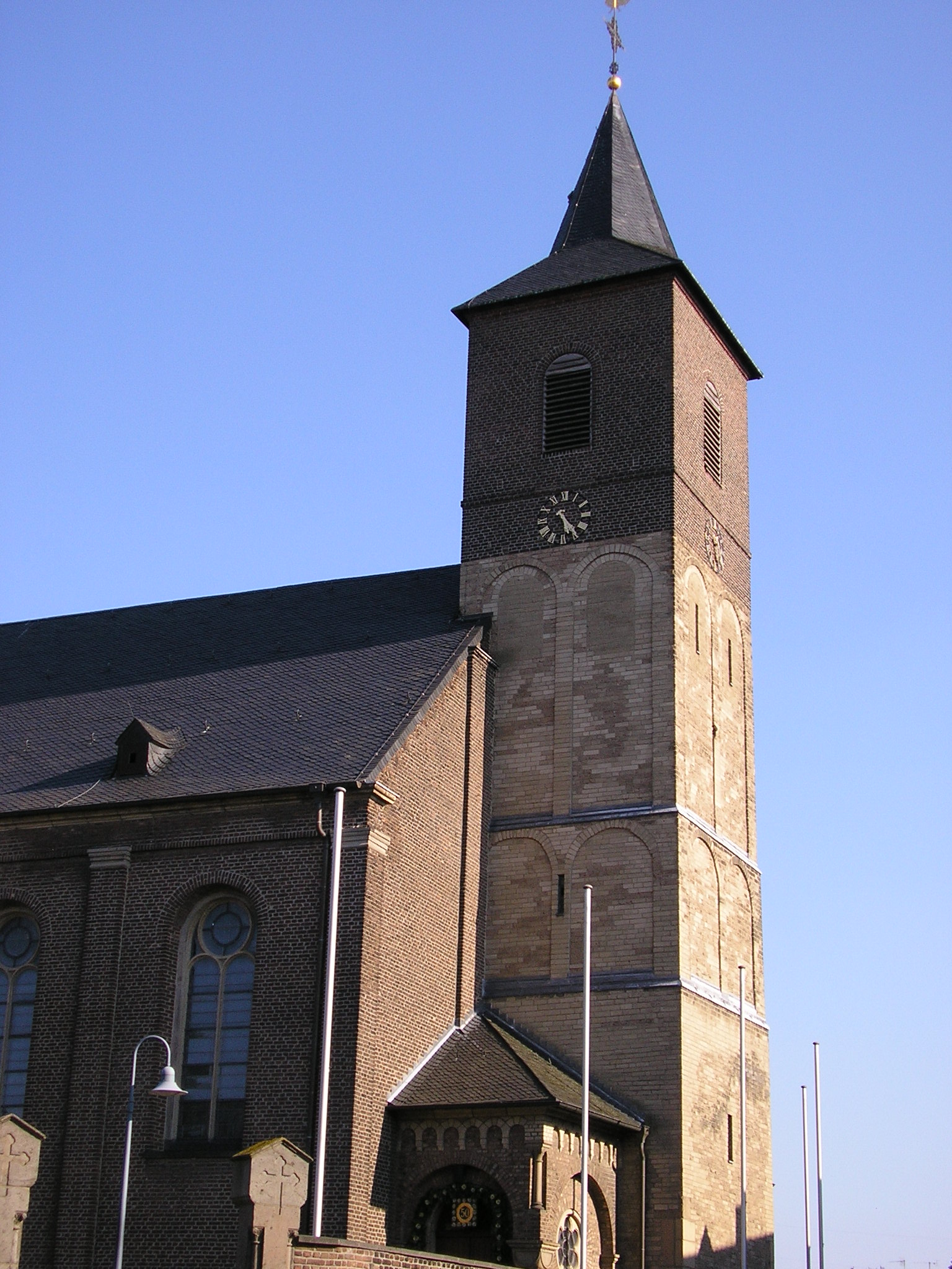 St. Pankratius Dormagen-Nievenheim, romischer Turm 12. Jh.